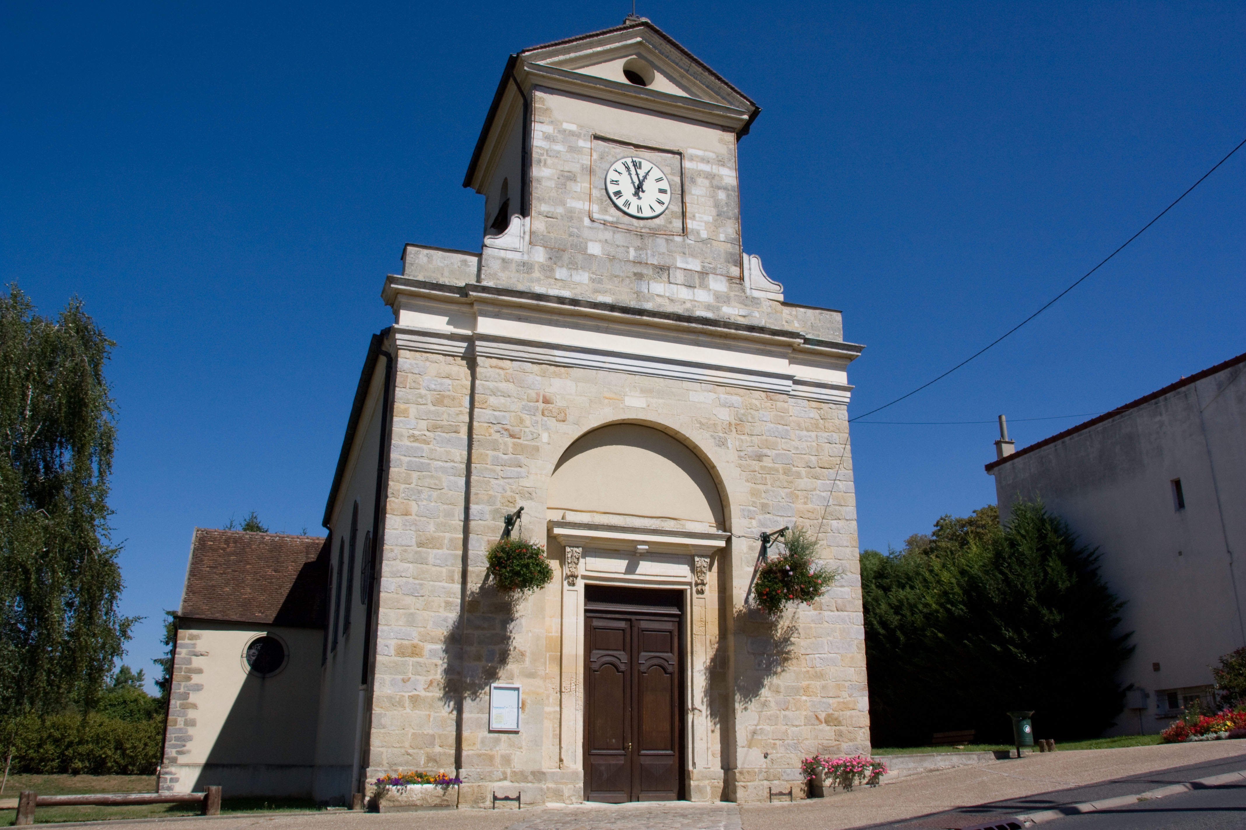 Eglise de Saintry-sur-Seine, Saintry-sur-Seine, Essonne, France